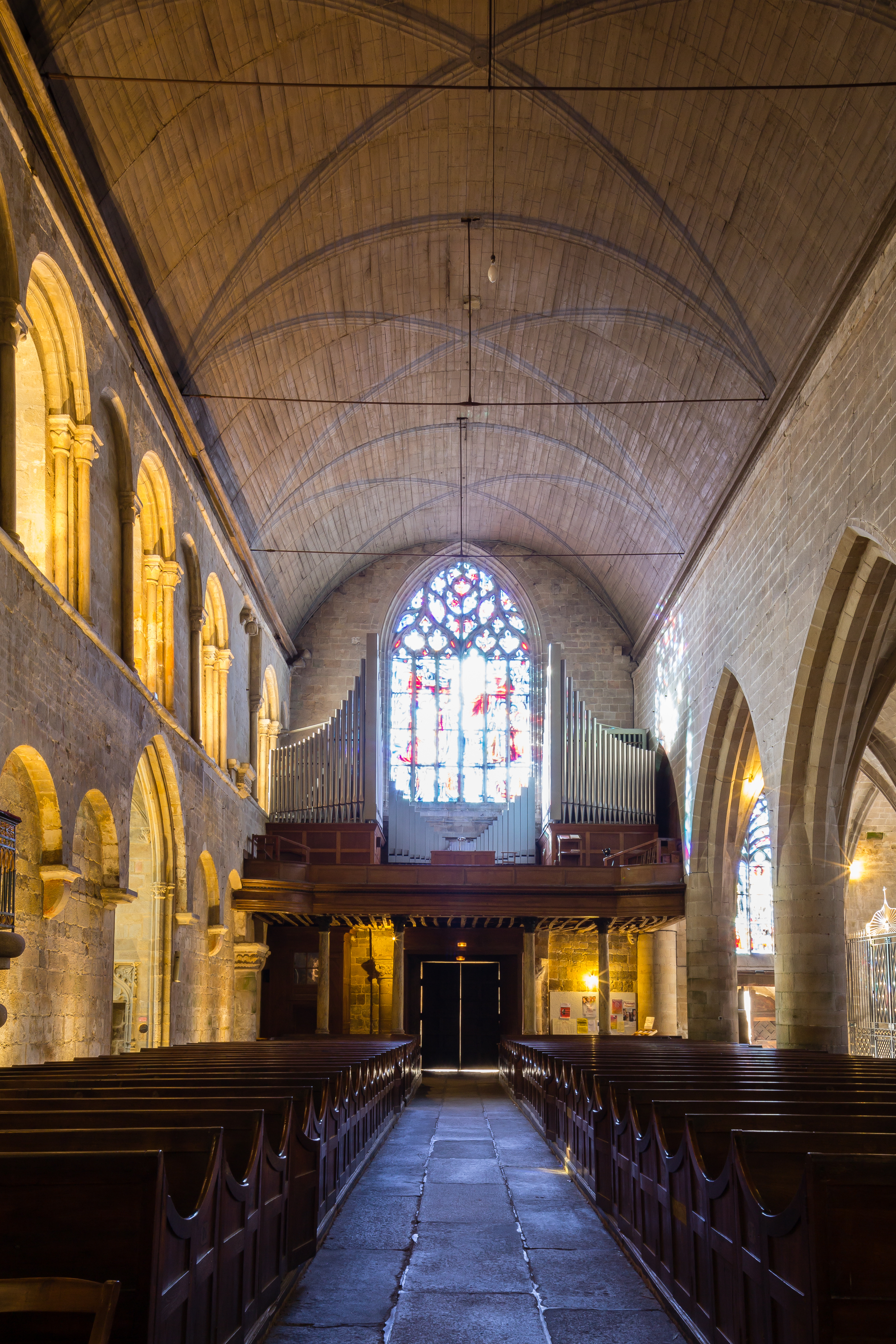 Nef de la basilique Saint-Sauveur de Dinan (France)